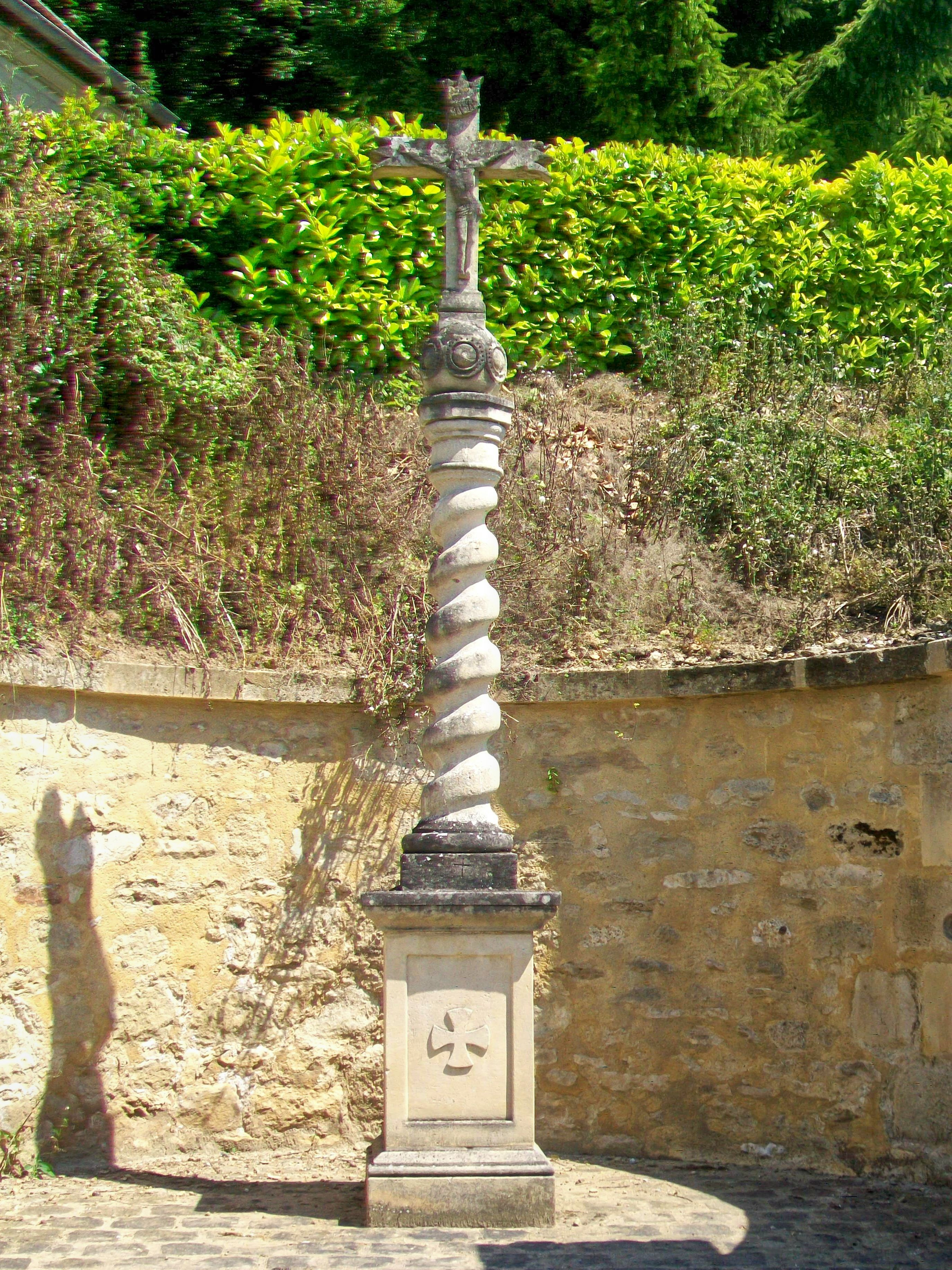 Le calvaire de Guiry ou croix St-Nicolas.